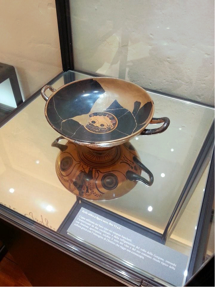 Una Kylix Attica del VI secolo a.C. a figure nere, di provenienza sconosciuta. Vi è raffigurato Dioniso, e due grandi occhi apotropaici. All'interno compare una testa di gorgone che nell'antichità aveva il potere di pietrificare con lo sguardo. Si tratta di un ammonimento a non bere troppo, una volta svuotata la tazza.